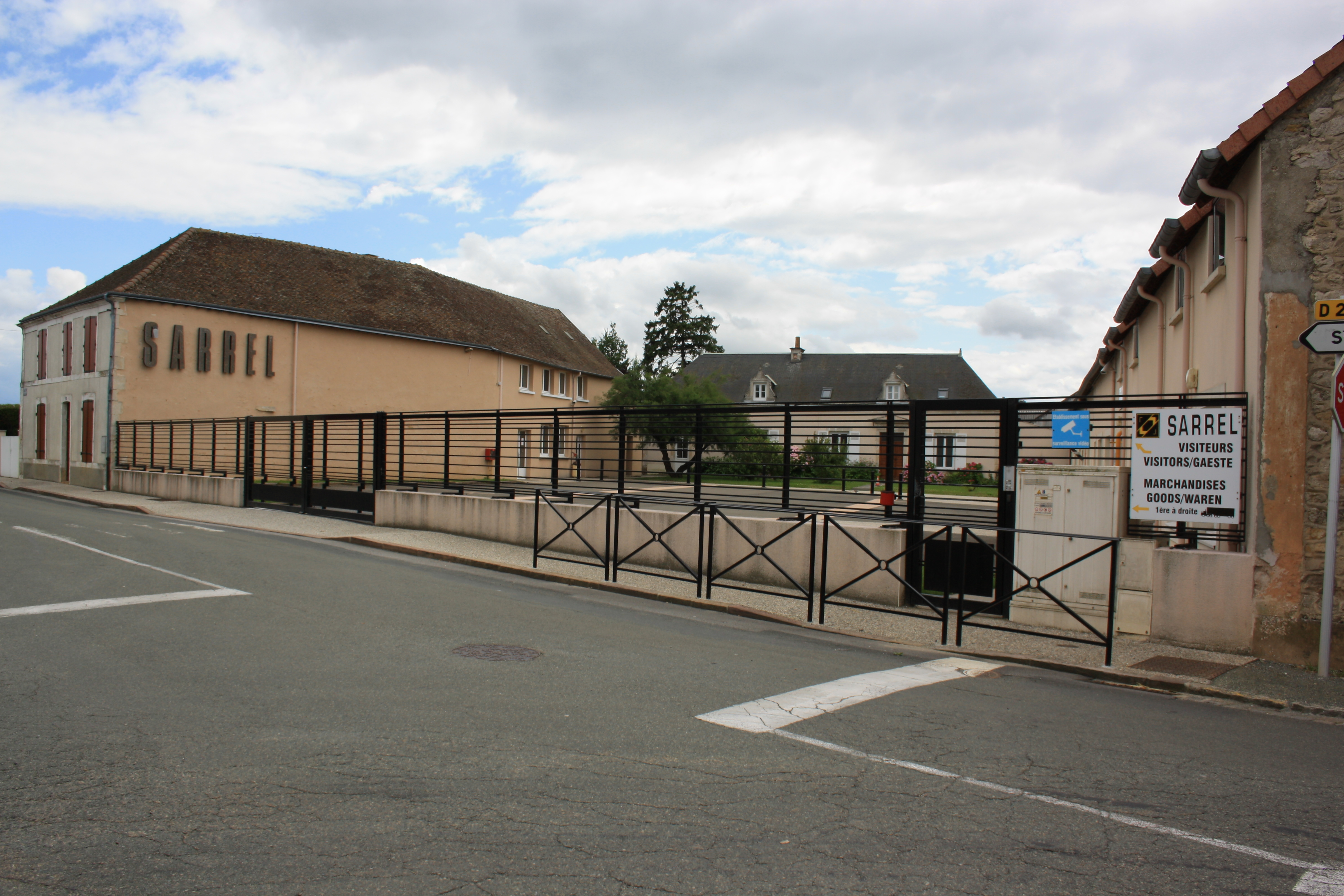 L'usine Sarrel, la force ouvrière de la ville